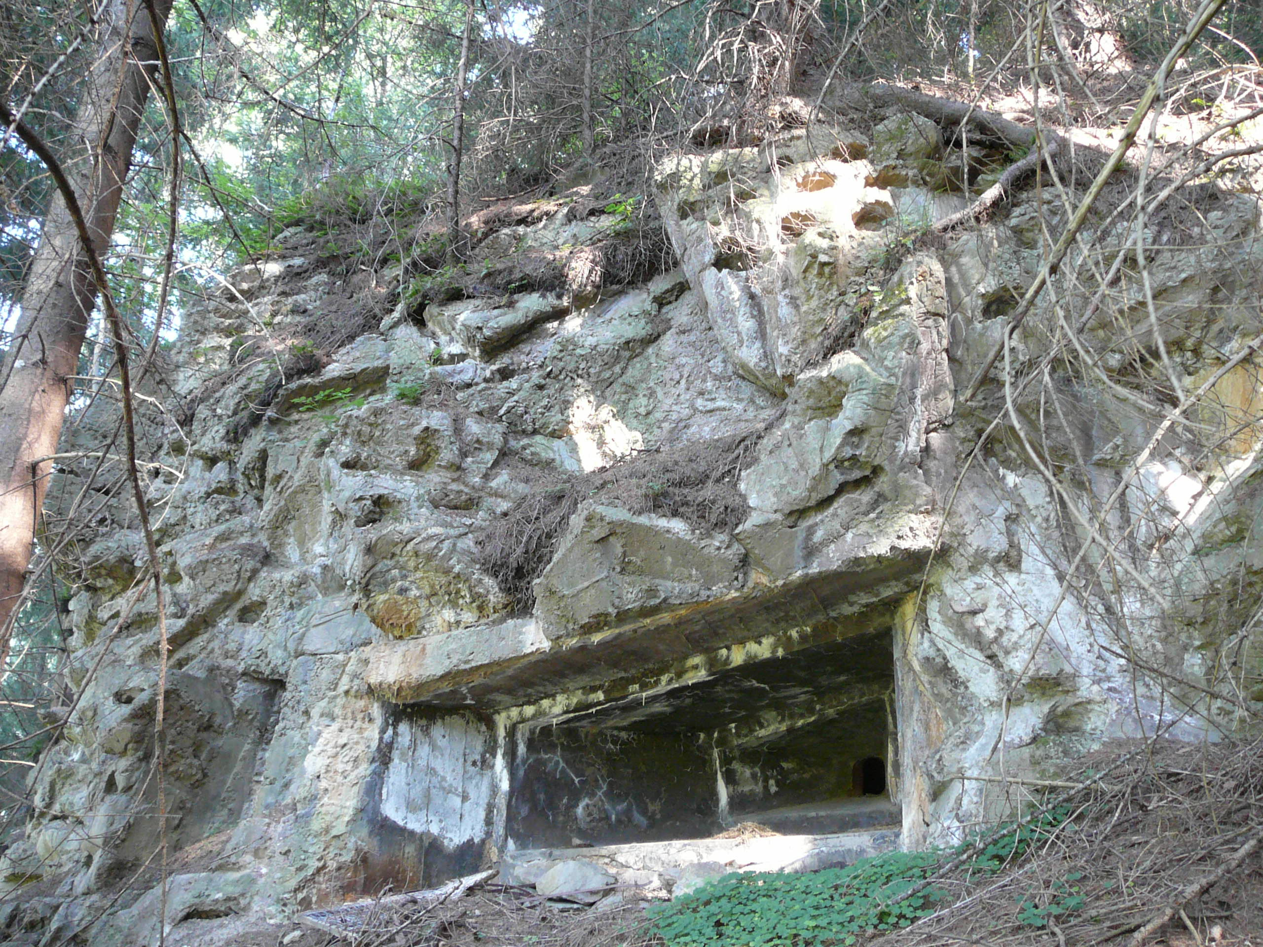 Opera 14 Mules